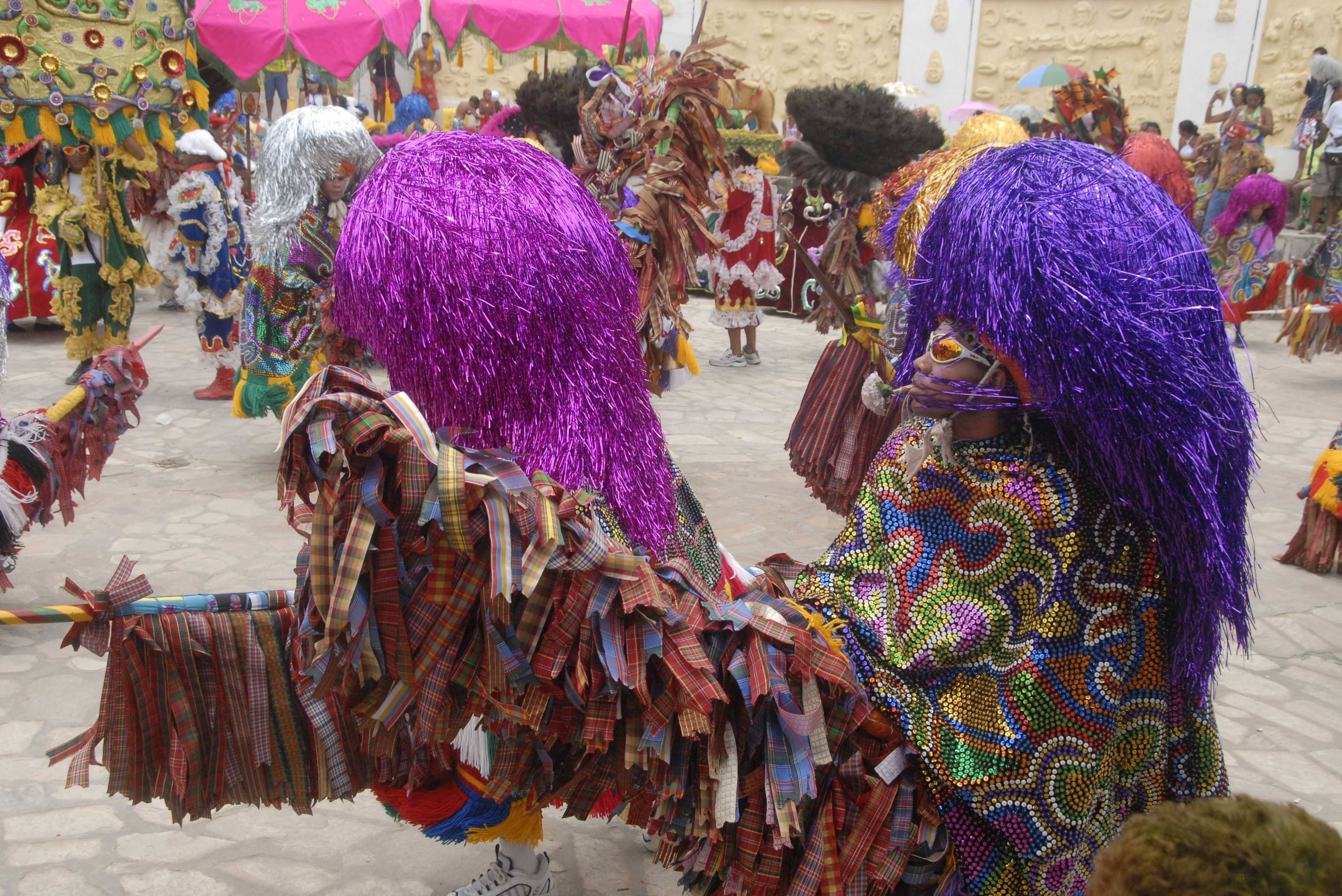 Carnival in Olinda. Foto: Passarinho/Pref.Olinda